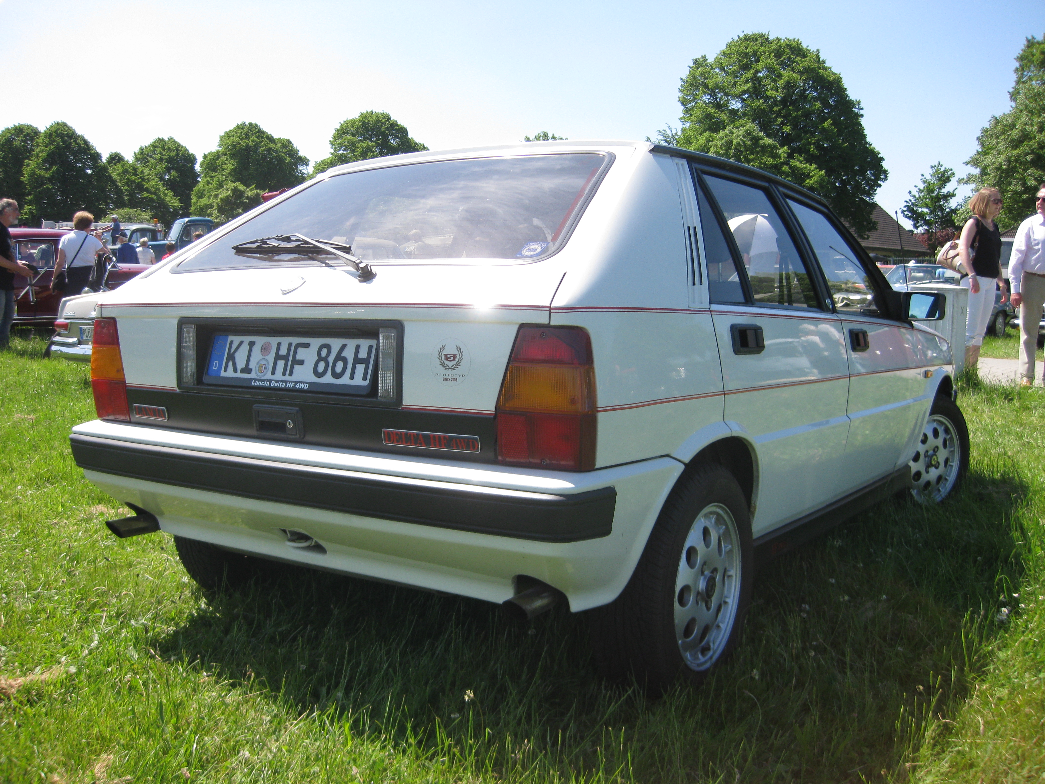 Lancia Delta HF 4WD